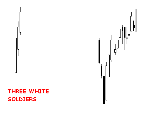 Analisi Tecnica, Candele giapponesi, Three White Soldiers